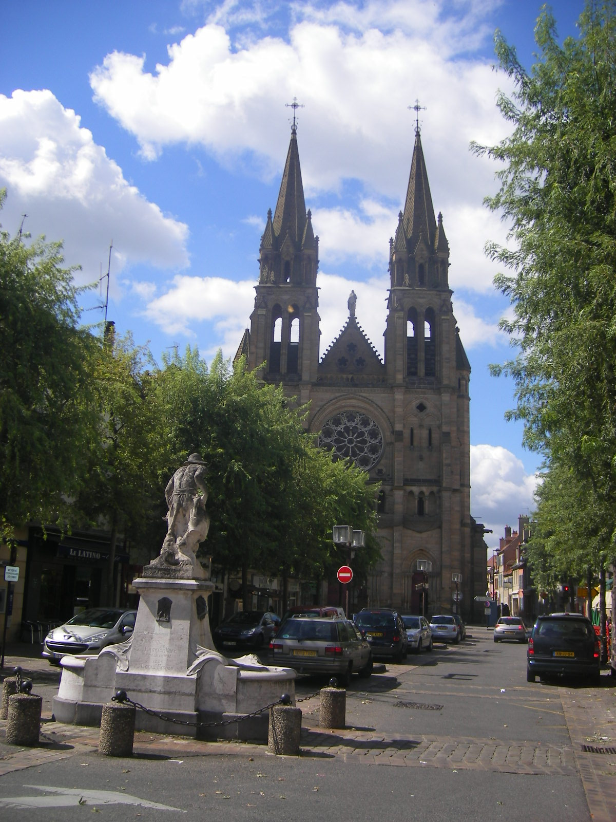 Moulins